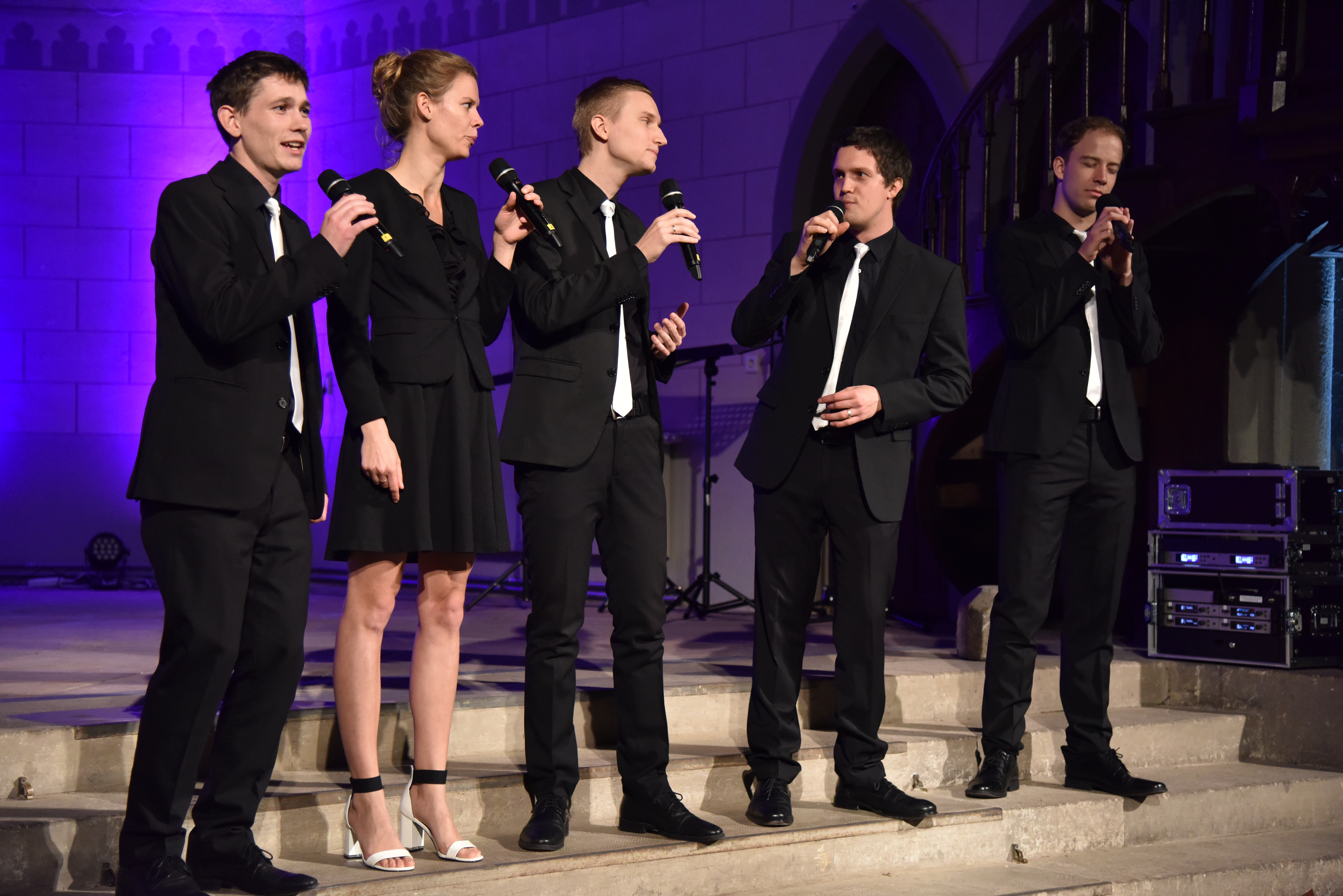 Fimmadur-LetztesKonzert-03.10.2019